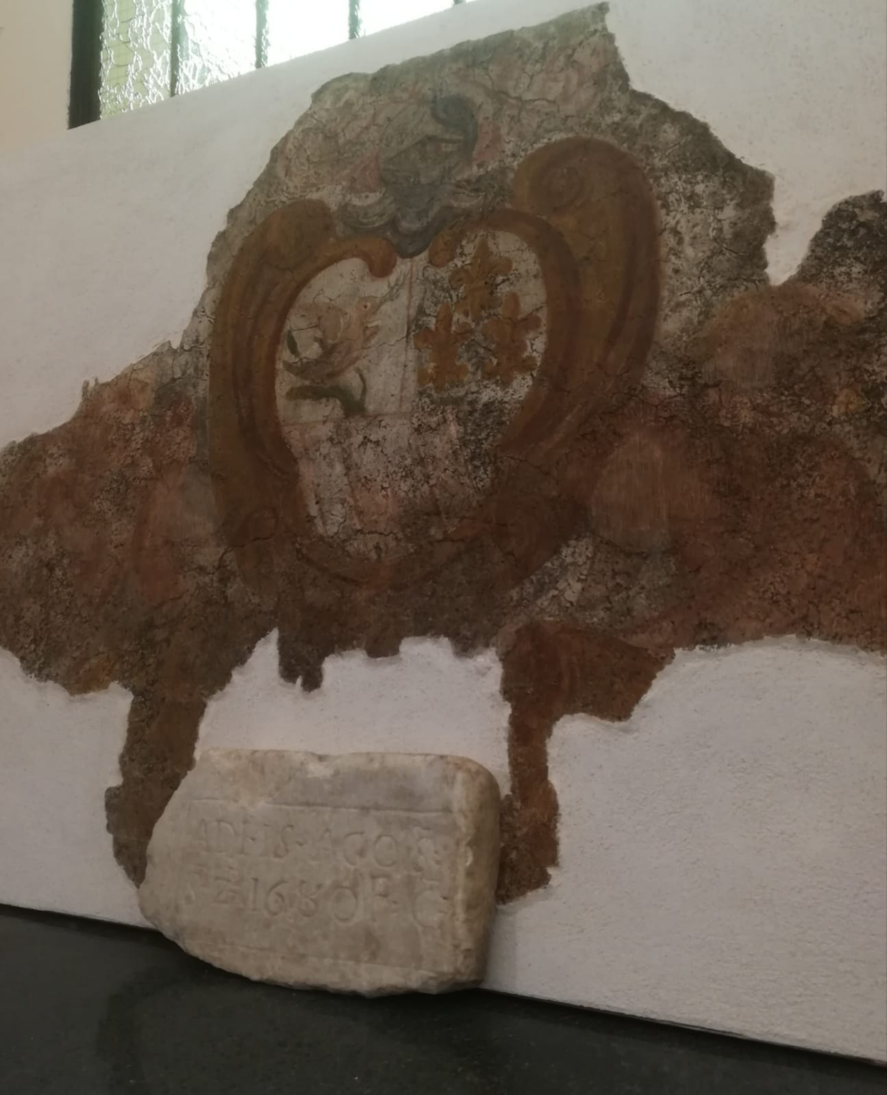 opera sita nel palazzo san massimo